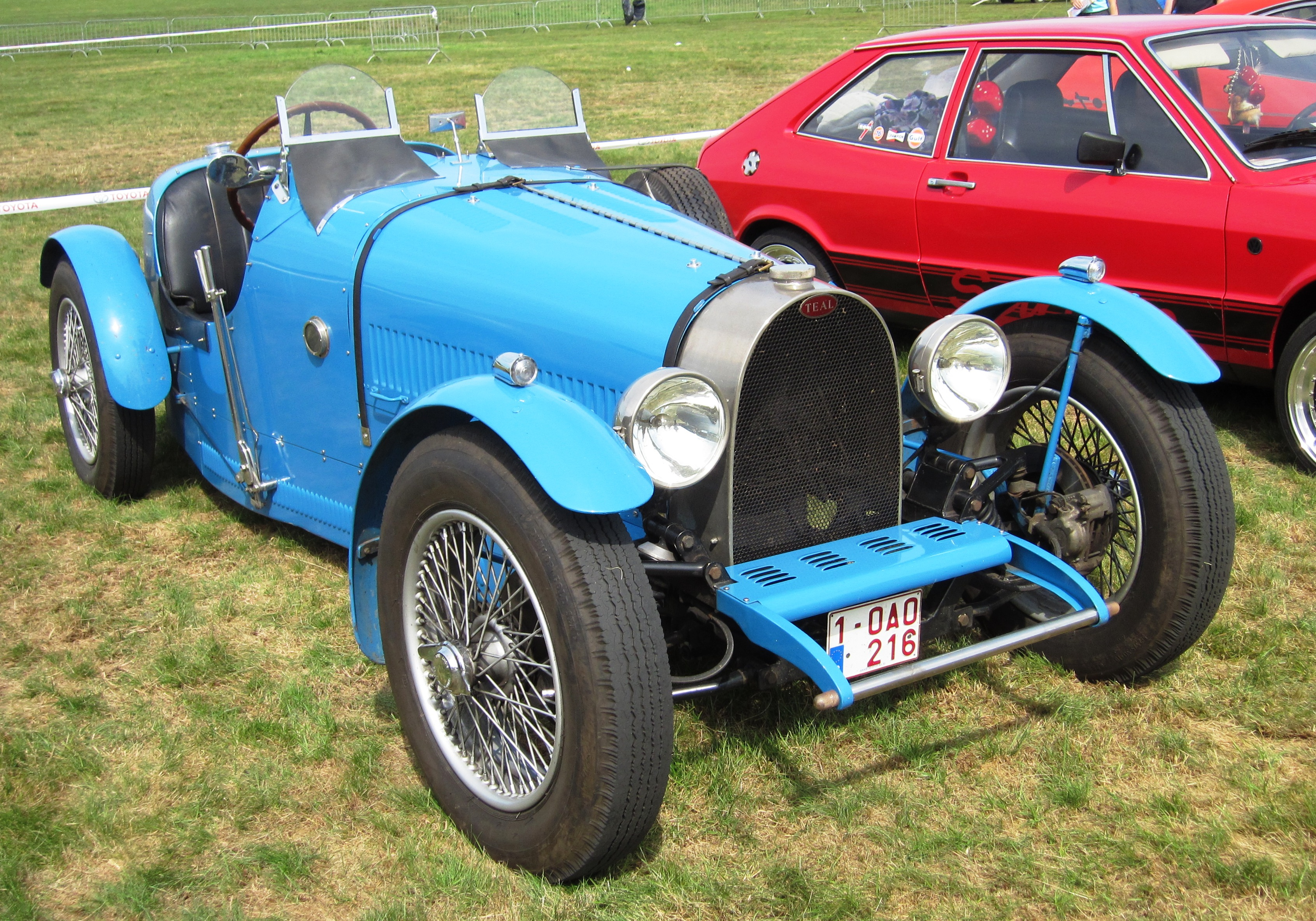 Teal T35 en Belgique